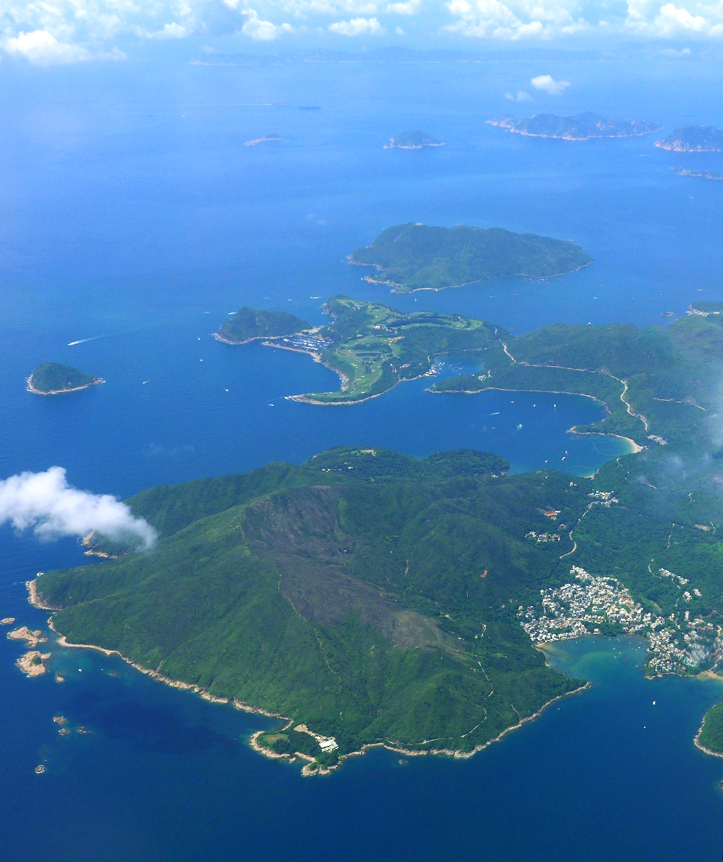 Tai Chik Sha